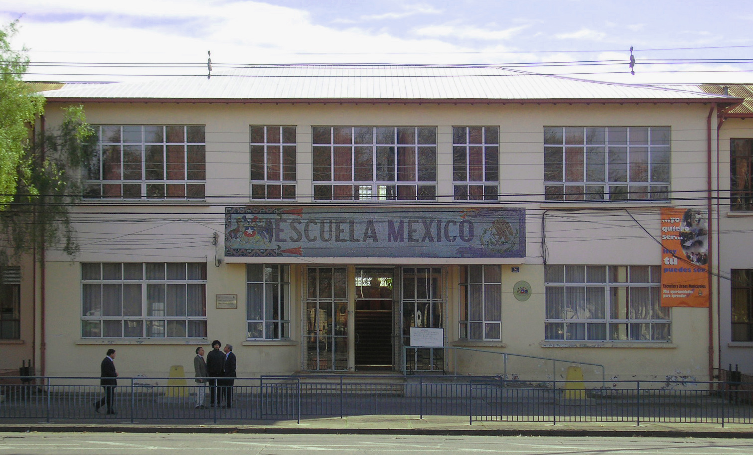 Escuela México de Chillán. Cuerpo central del edificio, en cuyo interior se ubican los murales de Siqueiros y Guerrero. This is a photo of a national monument in Chile: 1829